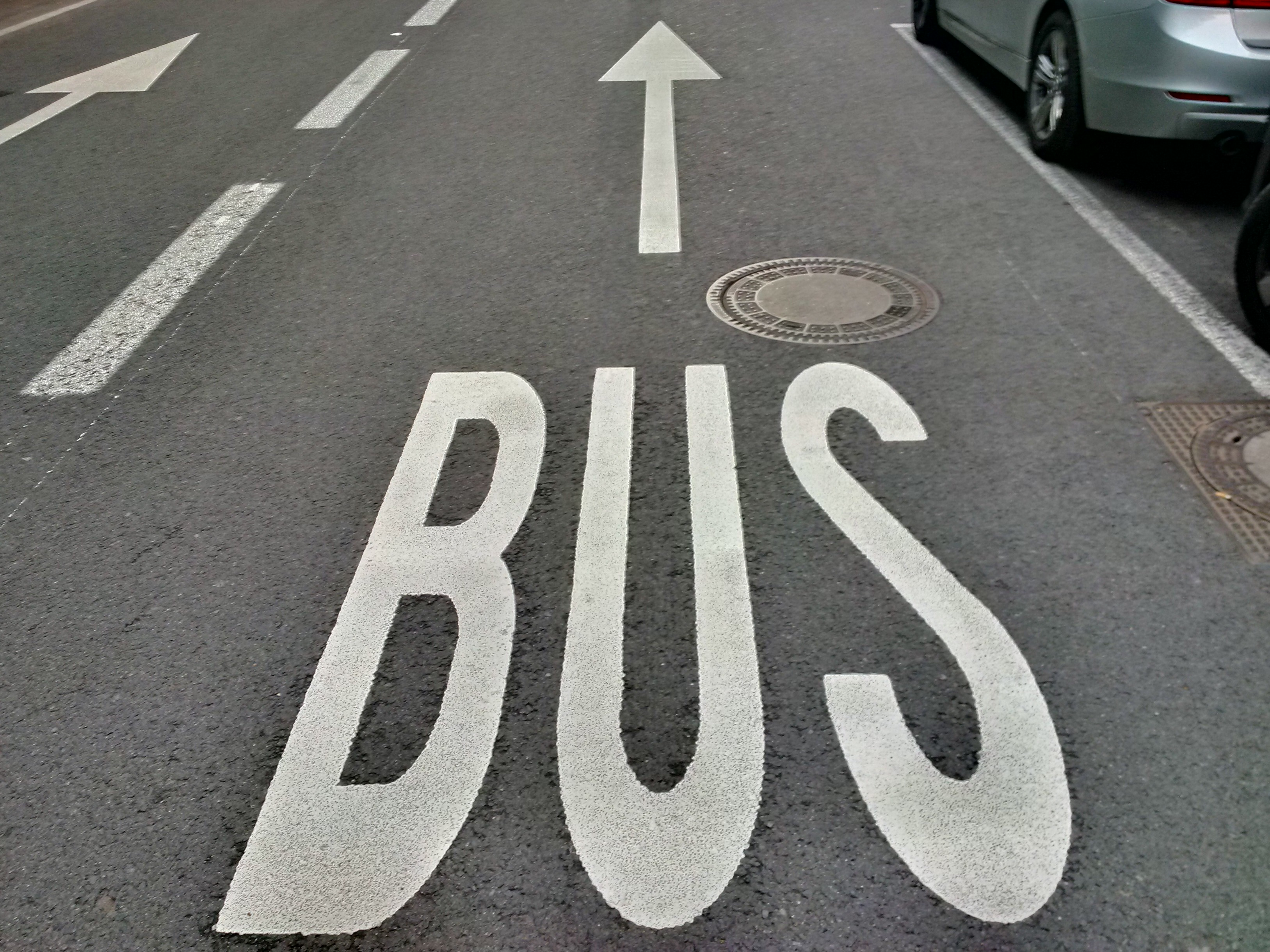 Signalisation horizontale du Code de la route luxembourgeois: répétition "BUS" sur une voie réservée aux services réguliers de transport en commun